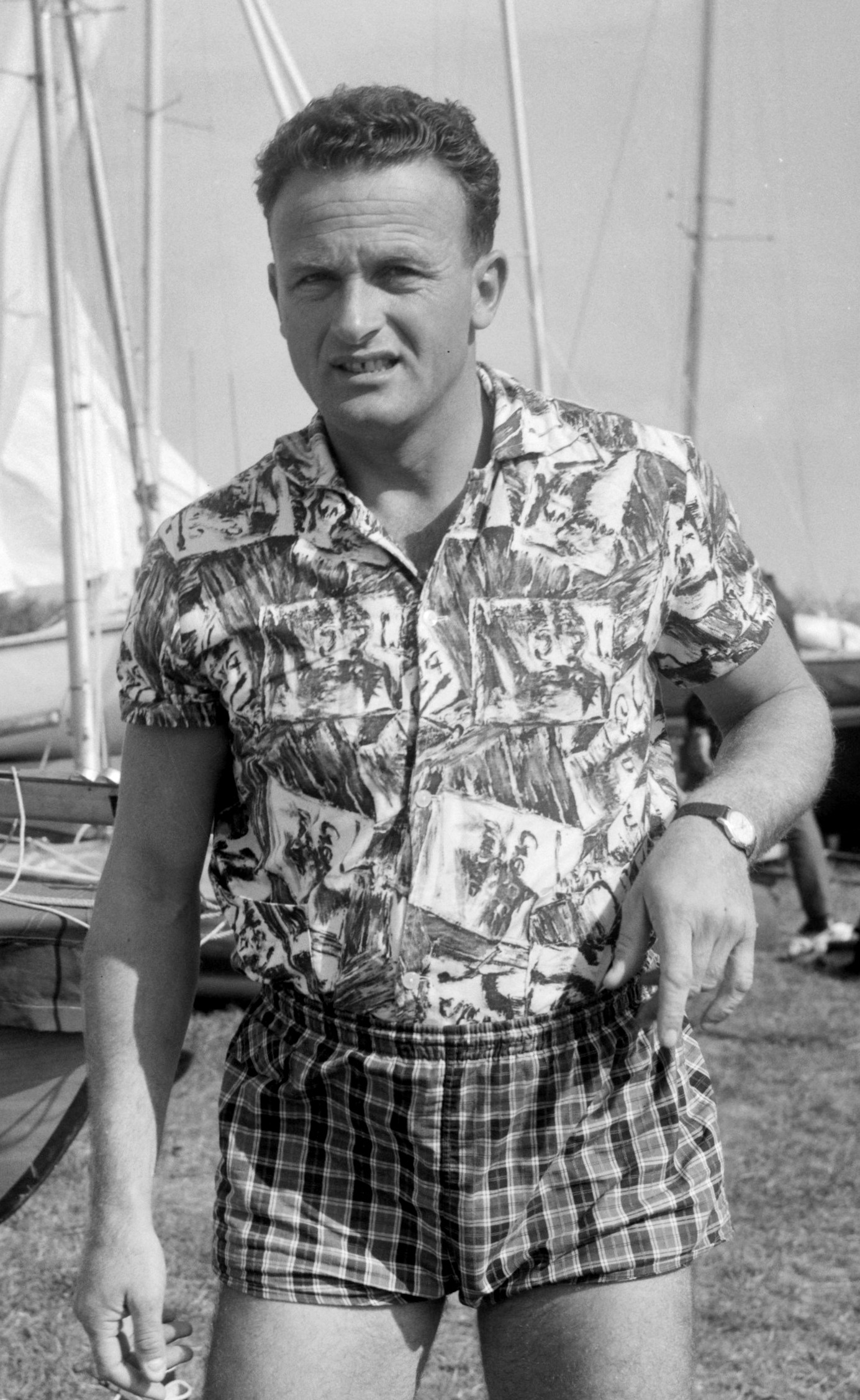 Zeilers voor Tokio, Ben Verhagen